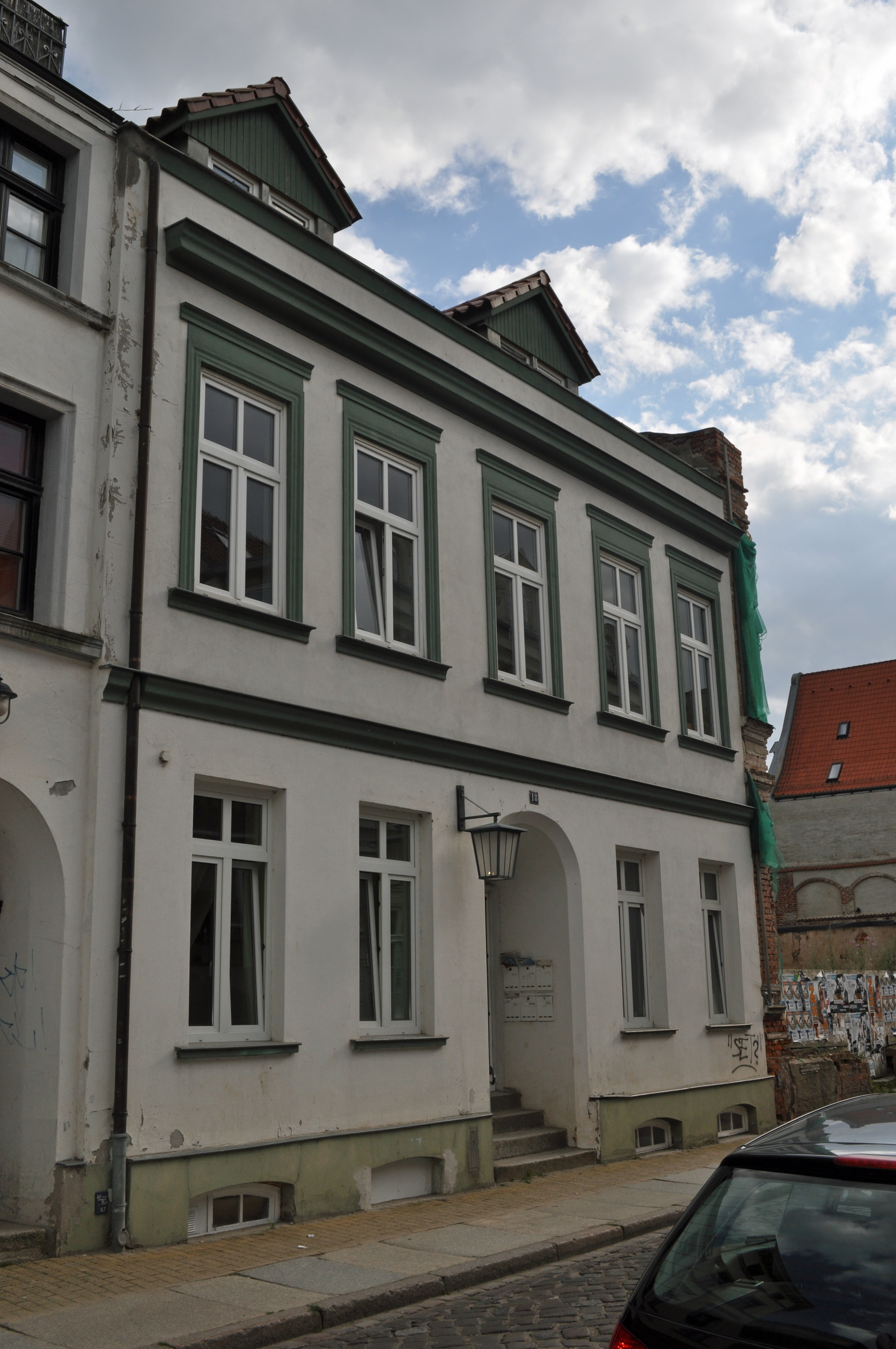 Das Foto zeigt ein Haus (bzw. Details des Hauses) in der Frankenstraße in Stralsund, Deutschland. Die Hausnummer steht im Dateinamen. Aufgenommen am 19. Juli 2011 vom Benutzer:Klugschnacker.